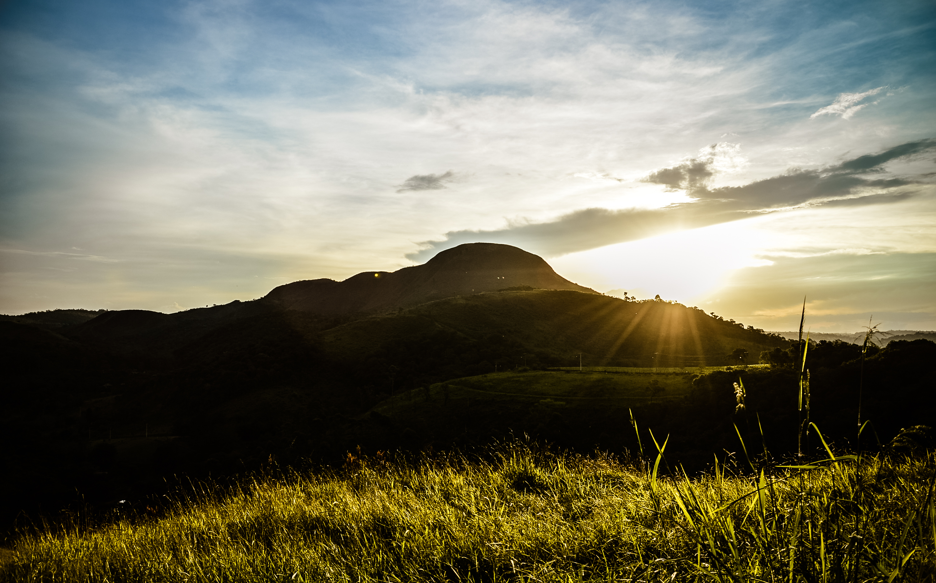 Ao Fundo por do sol no morro do sabó